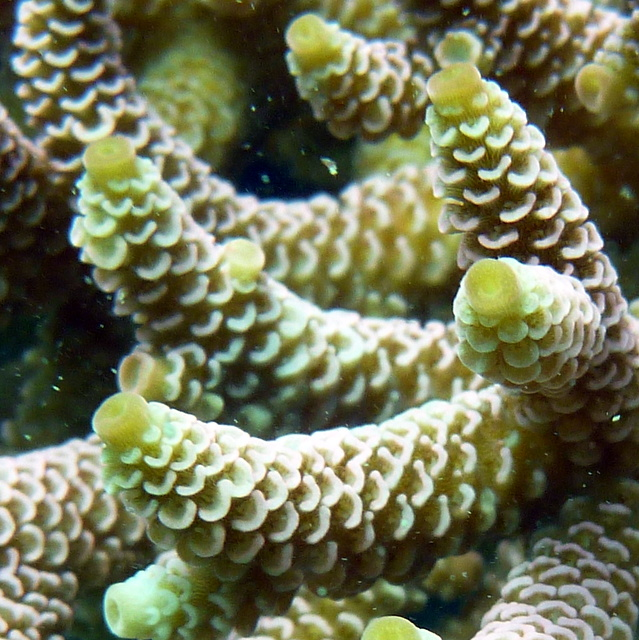 Acropora millepora, detalle de coralitos, isla Normanby, Australia